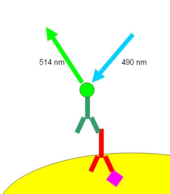 צביעה אימונוהיסטוכימית פלורוסנטית בעזרת נוגדן שניוני מצומד ל FITC, מולקולה פלורוסנטית הקולטת אור באורך גל 490nm (תכלת) ופולטת אור בצבע 510nm (ירוק).